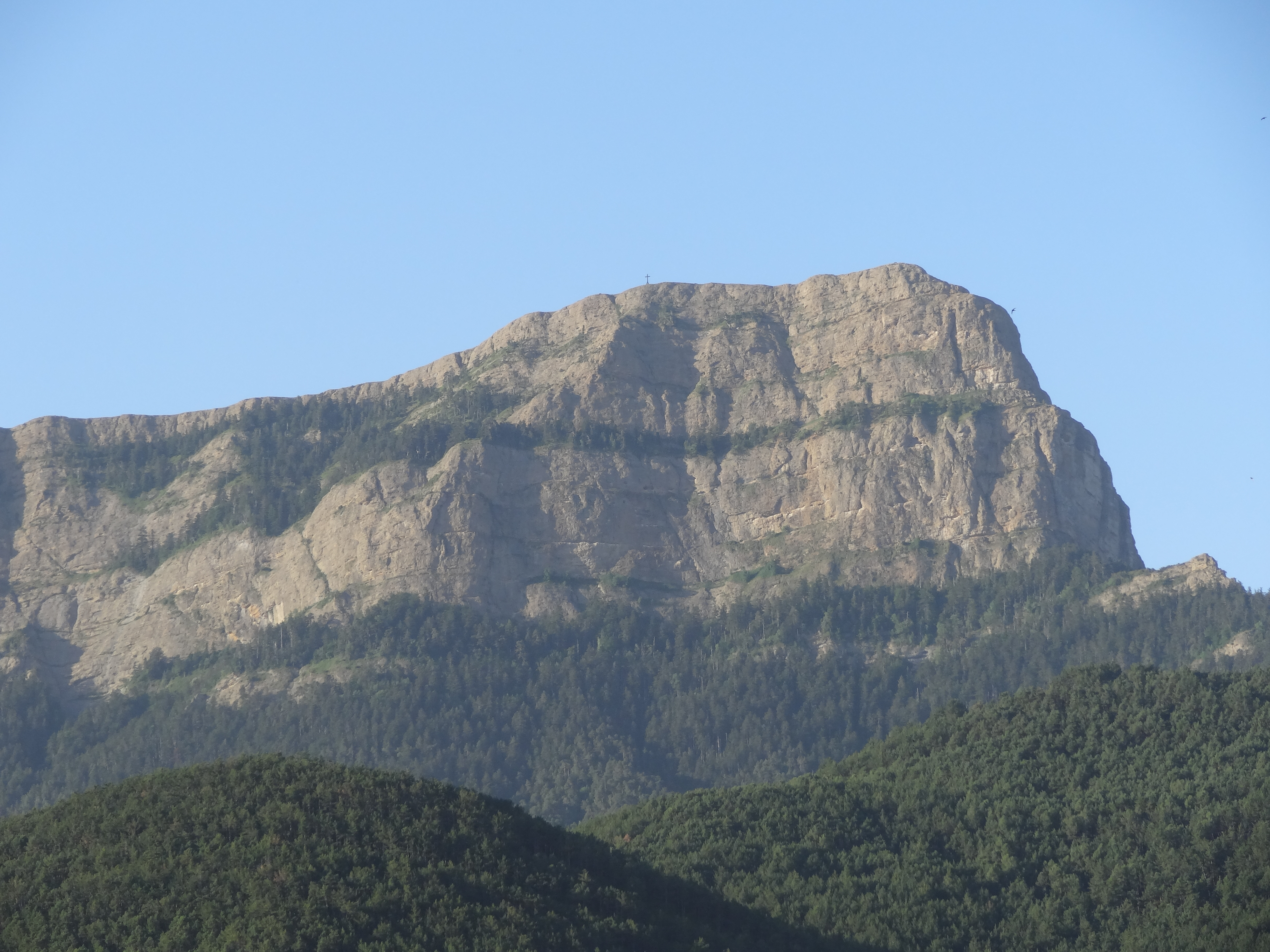 Oroel